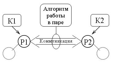 Принципальная схема технологии парного обучения